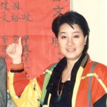 1990年代，臺灣電視公司內部的一次徵文比賽，楊麗花在得獎名單前留影。